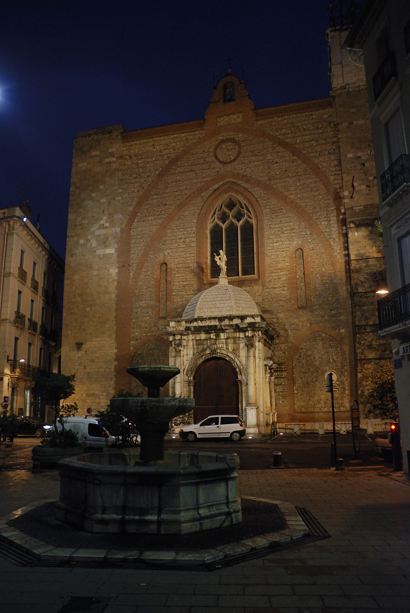 Perpignan, France